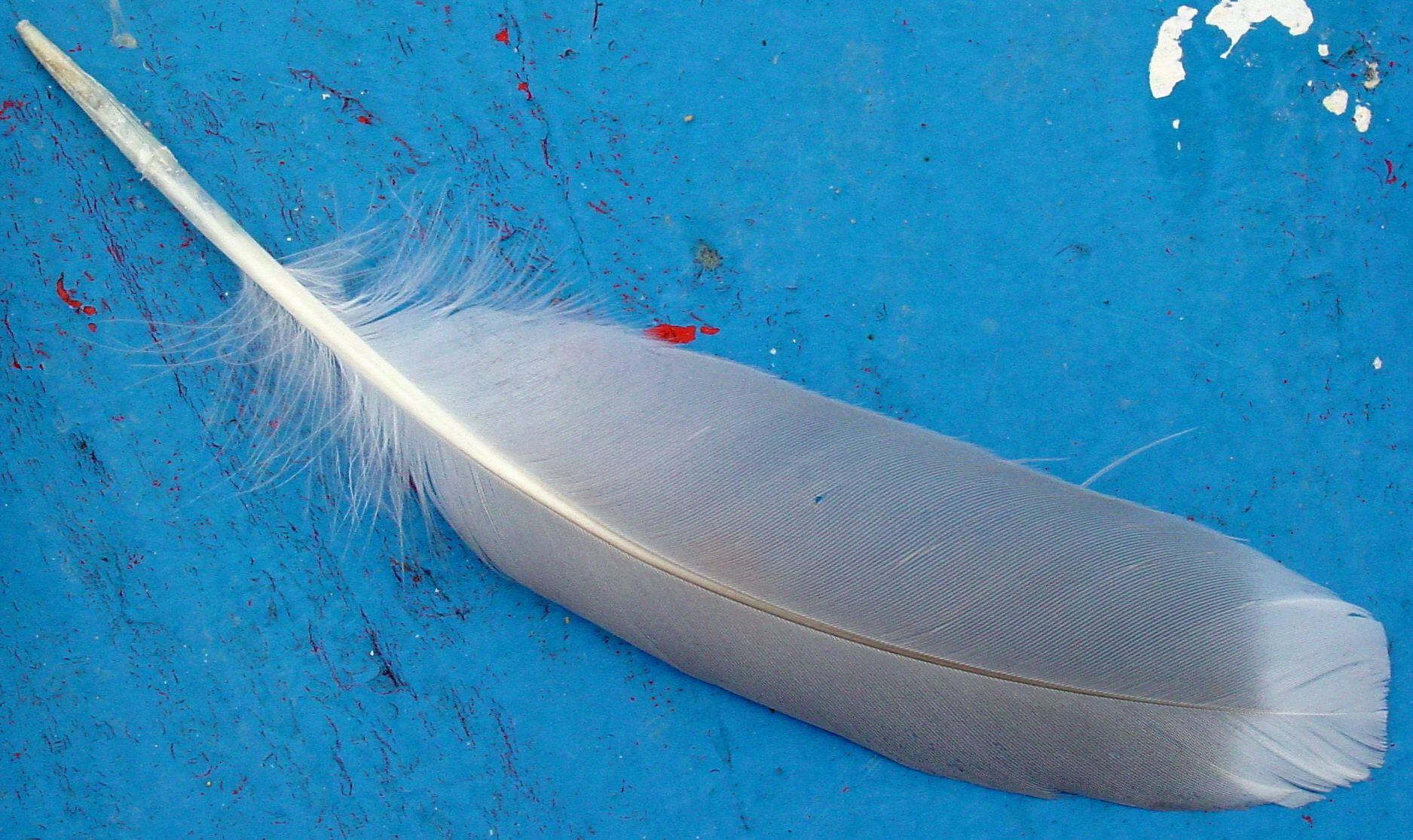 self made. Castiñeiras - Ribeira - Galicia - Spain